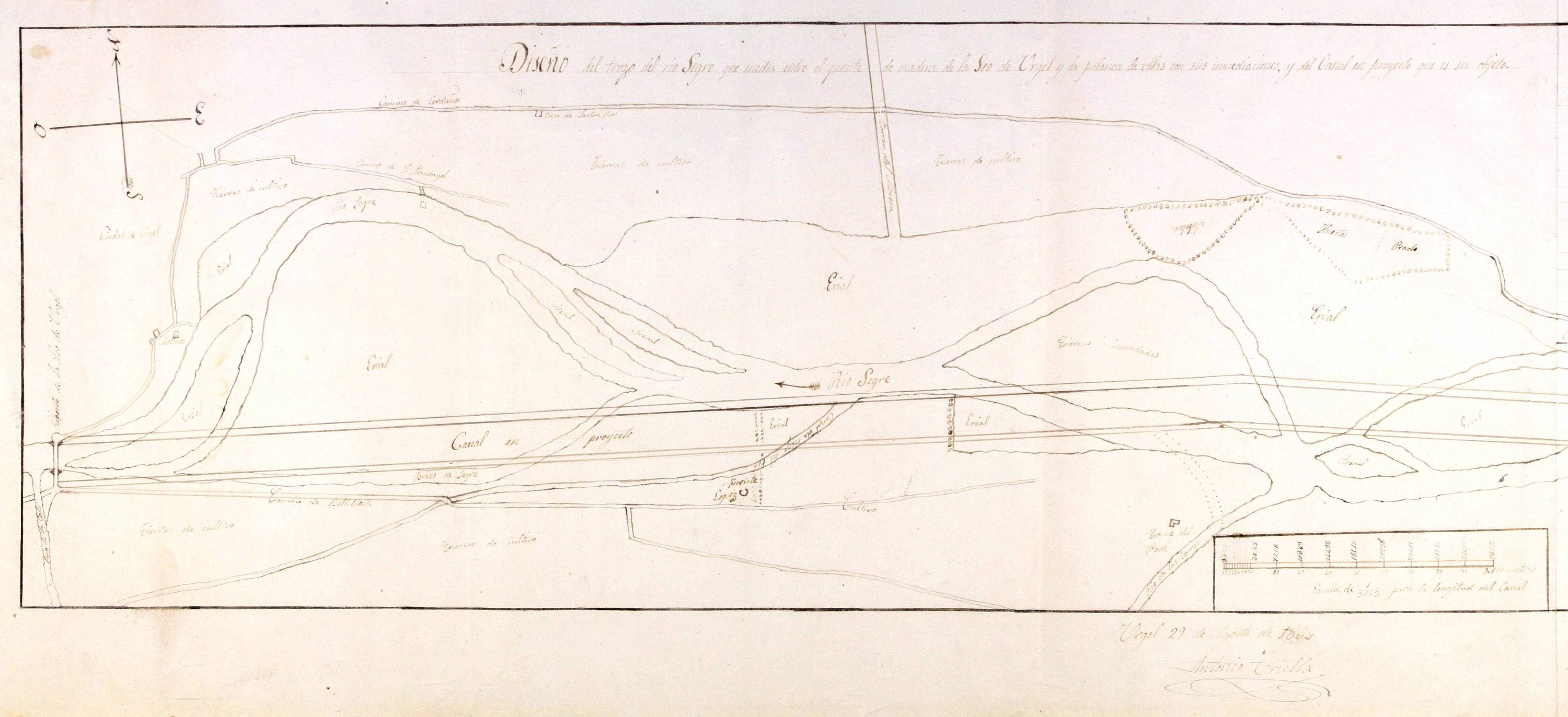 Dades tècniques Títol: Projecte de canalització del Segre Data: 29 d'agost de 1865 Suport material: Paper Mides: 297x755 mm